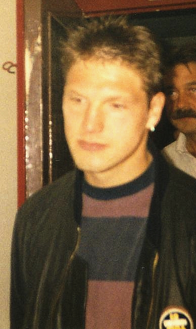 Martin Driller 1992/1993